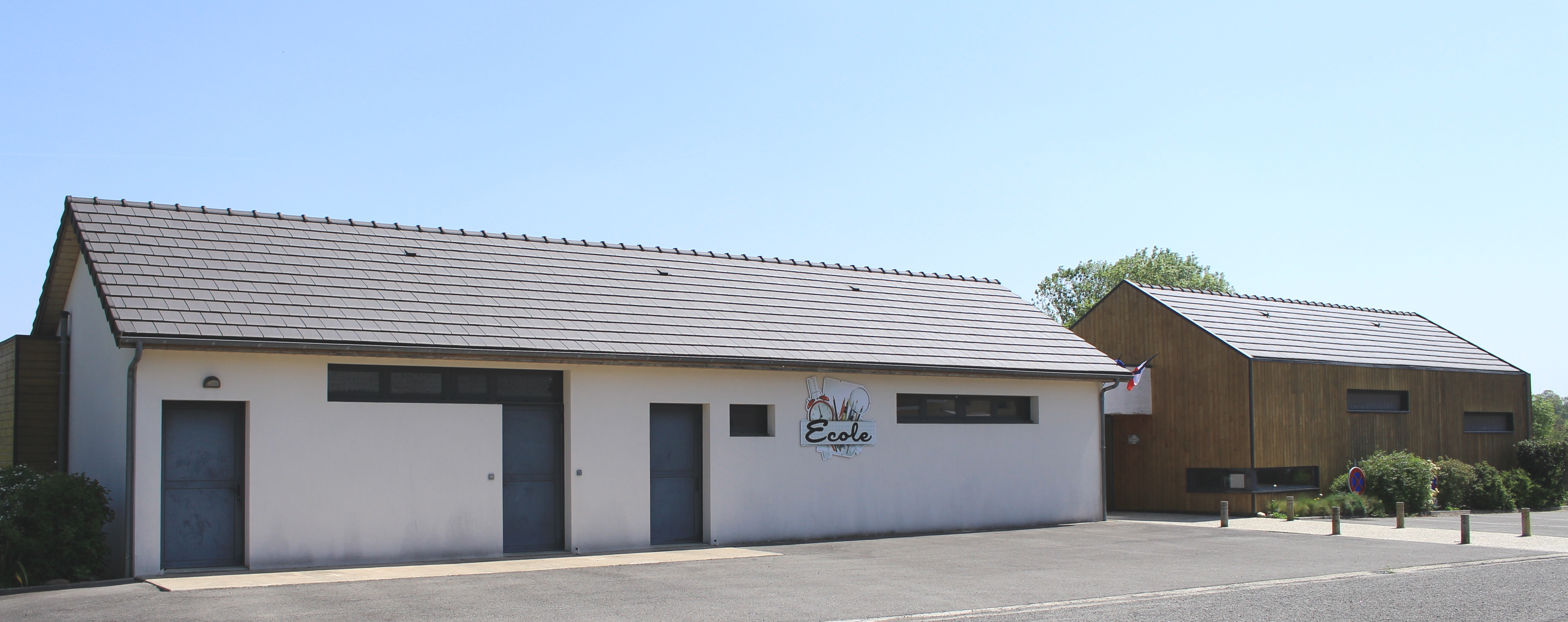 École de Luquet (Hautes-Pyrénées)